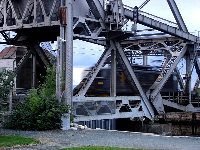 Zvedací most , Trondhaim, Norway